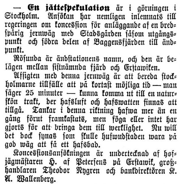 Tidningsklipp angående Saltsjöbanan: En jättespekulation är i görningen i Stockholm. Ansökan har nemligen inlemnats till regeringen om koncession för anläggande af en bredsparig jernwäg med Stadsgården såsom utgångspunkt och södra delen af Baggensfjärden till ändpunkt. Rösunda är ändstationens namn, och den är belägen mellan sistnämnda fjärd och Erstawiken. Afsigten med denna jernwäg är att bereda stockholmarne tillfälle att på kortast möjliga tid — man säger 25 minuter — kunna komma ut till en naturskön trakt, der hafsluft och hafswatten finnas att tillgå. Tankar i denna riktning hafwa mer än en gäng förut framkastats, men föga eller intet har gjorts för att bringa dem till werklighet. Nu will det dock synas som skulle hufwudstaden wara pa god wäg att få ett hafsbad. Koncessionsansökningen är undertecknad af hofjägmästaren H. af Peterseus på Erstawik, grosshandlaren Theodor Nygren och bankdirektören K. A. Wallenberg.